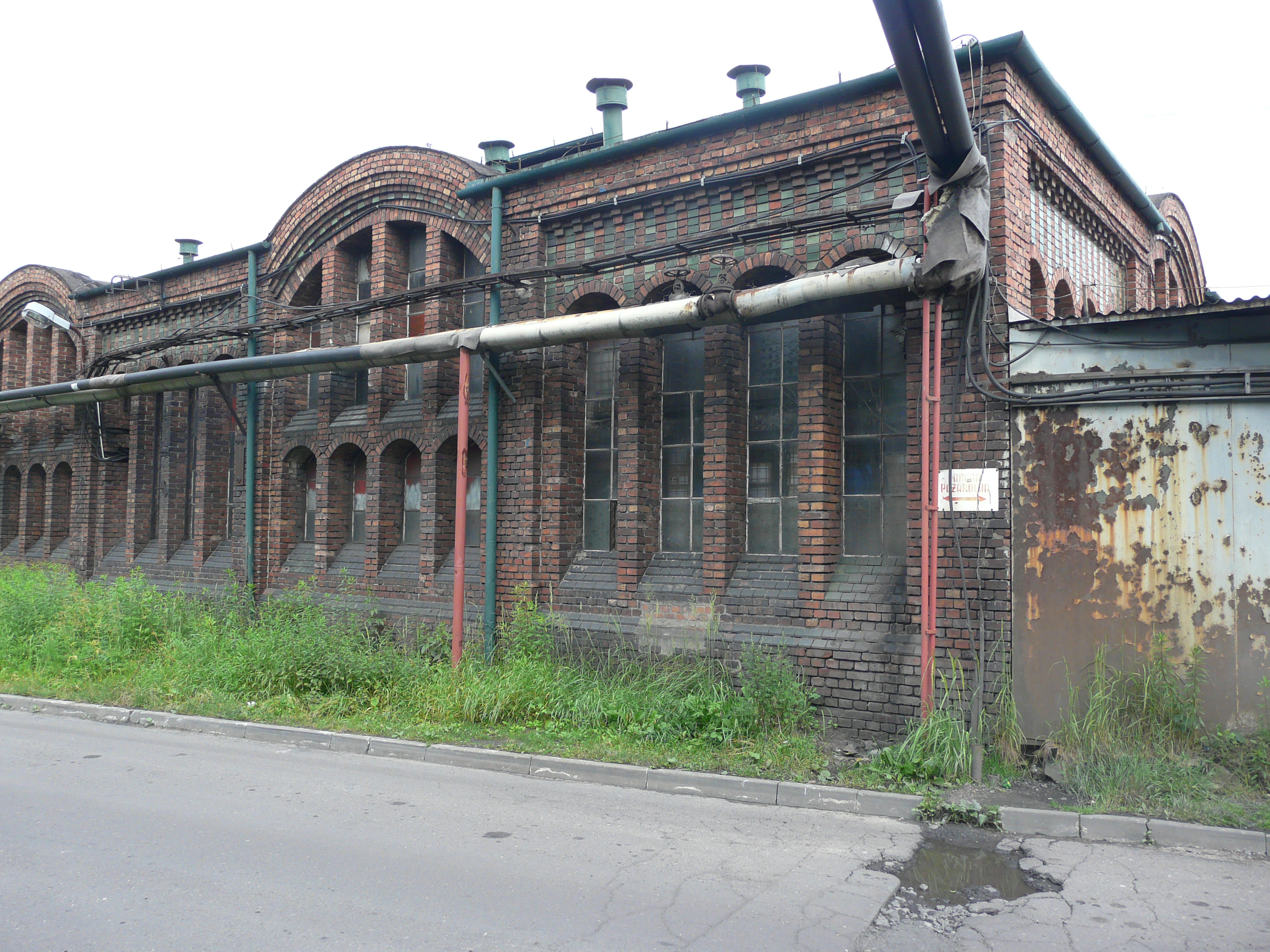 Wieczorek Coal Mine